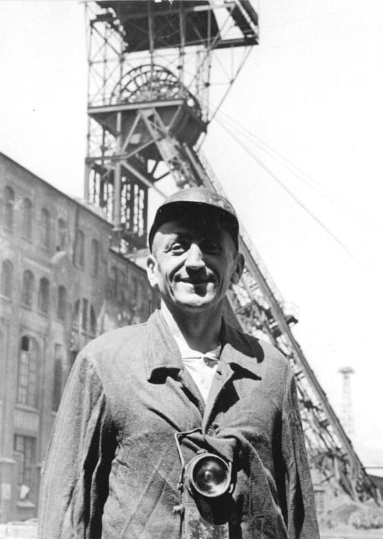 Kaliwerk Volkenroda, Förderturm, Bergarbeiter Zentralbild TBD 5.7.1952 Häuser Emil Silz vom Kaliwerk Volkenroda.